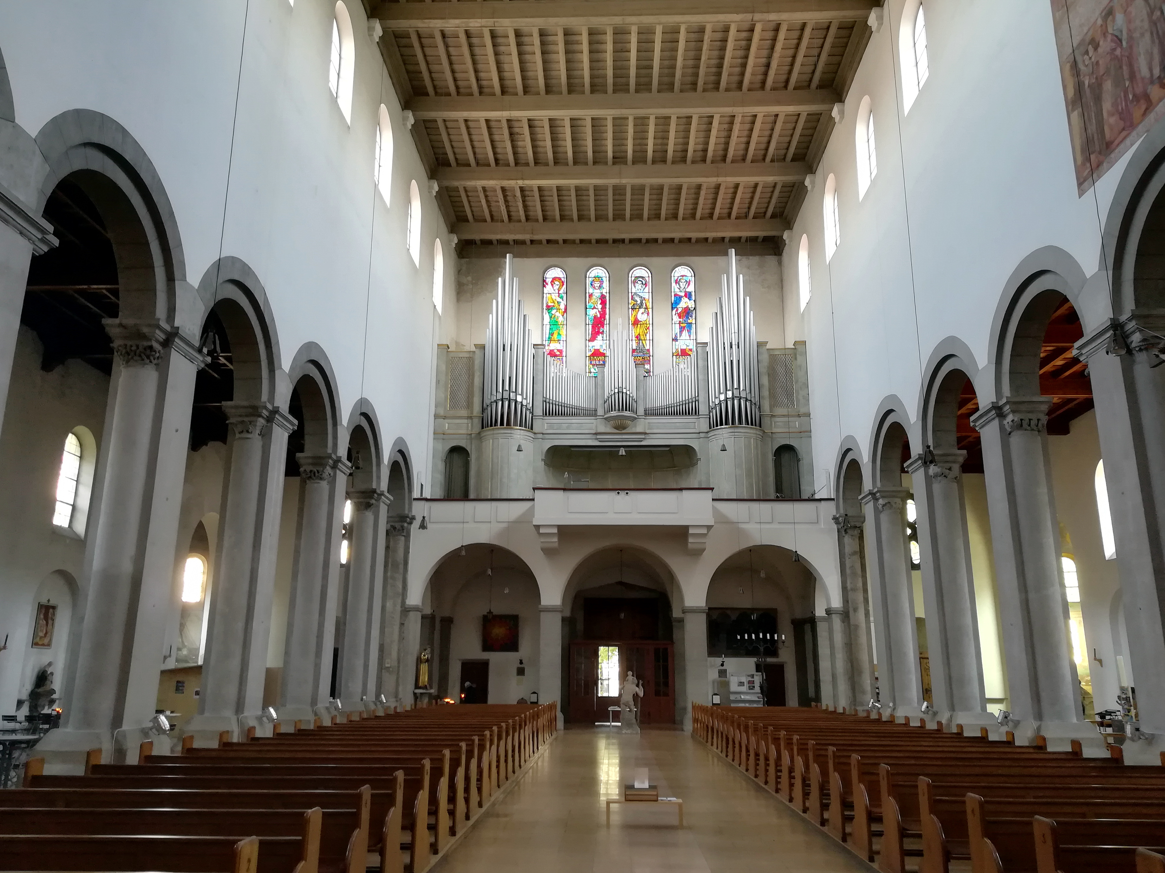 Die römisch-katholische Kirche St. Maximilian ist die erste Pfarrkirche der Isarvorstadt in München, deren Sprengel im Wesentlichen das Glockenbachviertel umfasst.